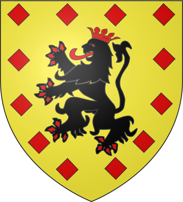 Blason : D'or, au lion de sable gueulé, armé, lampassé et couronné de gueules; accompagné de douze carreaux de même posés en orle.